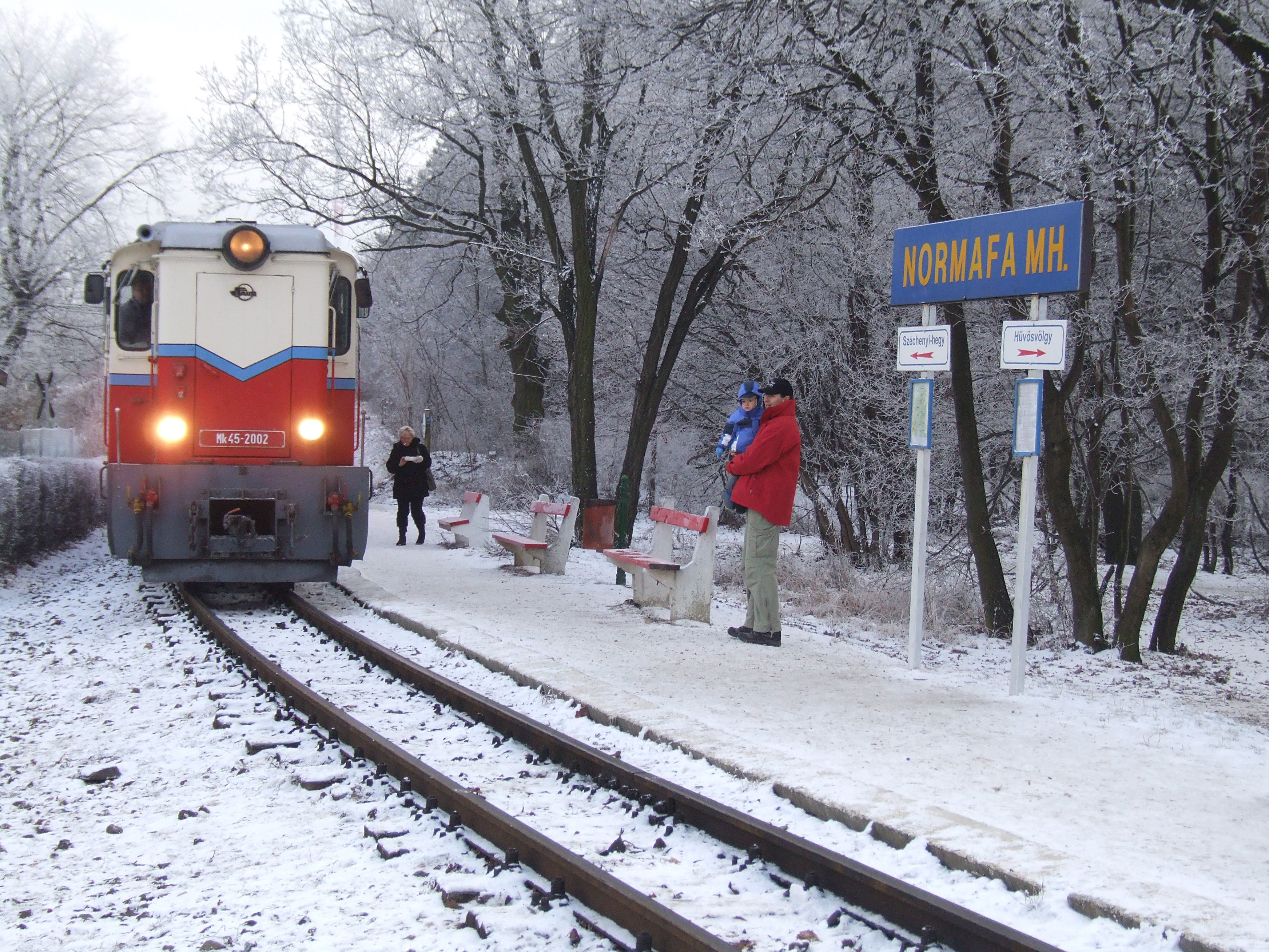 Normafa Vonat érkezik